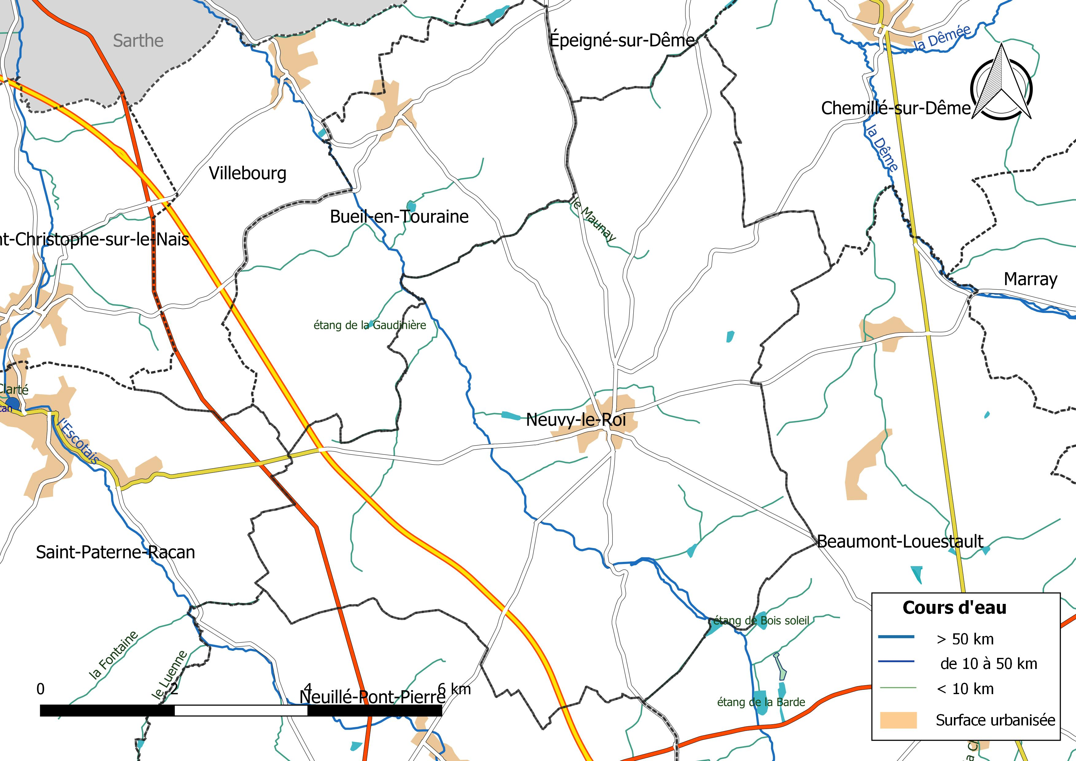 Carte du réseau hydrographique de la commune de Neuvy-le-Roi (France).